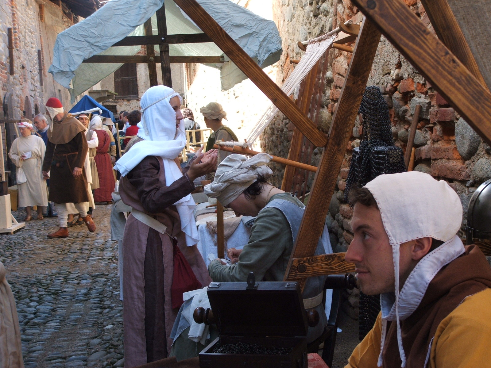 Candelo, ricetto di Candelo, manifestazione medioevale Sapor di Medioevo